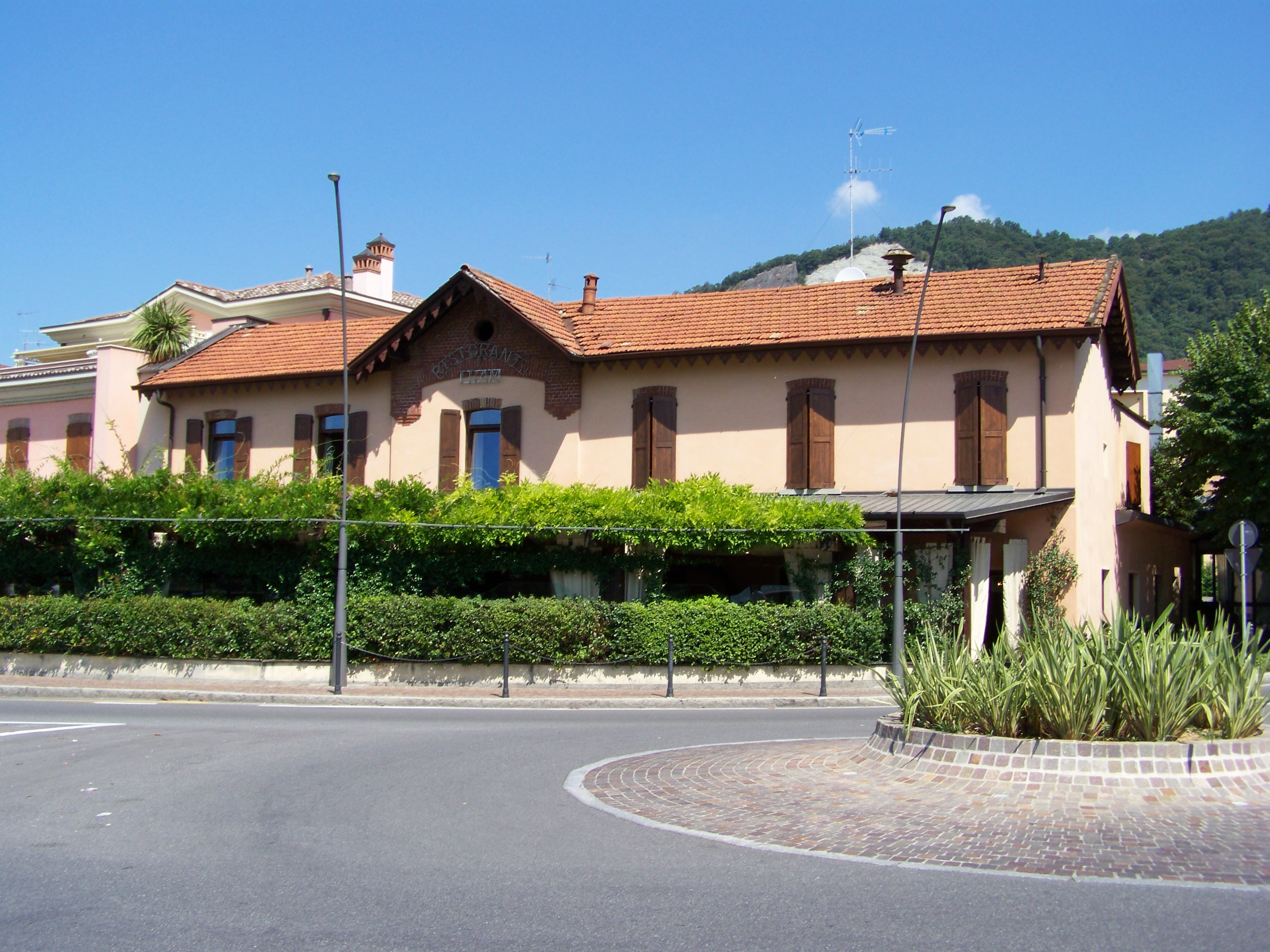 Il fabbricato viaggiatori, oggi riconvertito a ristorante, della stazione terminale di Sarnico della tranvia diretta a Trescore Balneario e a Bergamo.